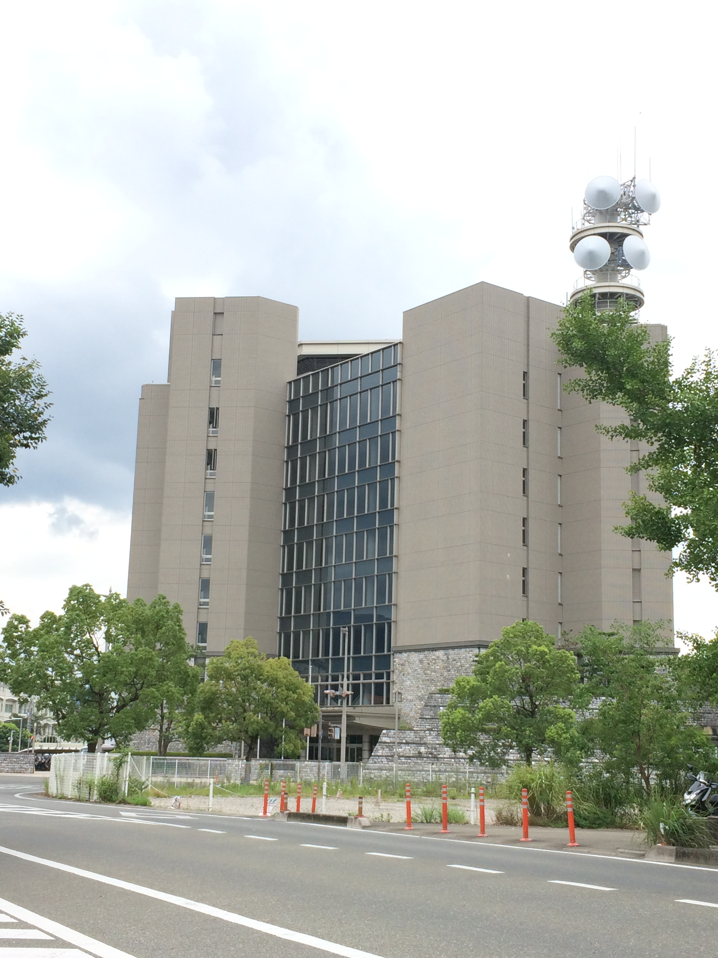 高知県警察本部